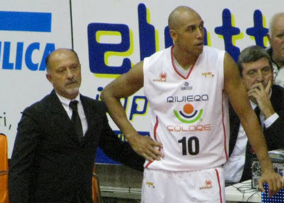 Giancarlo Sacco e Carlton Myers durante Crabs Rimini-Scafati Basket, stagione 2009-2010. Dietro a loro, il GM Renzo Vecchiato.